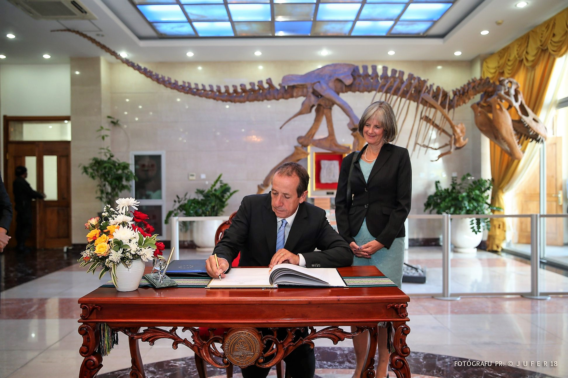 Andrew Jacobs übergibt seine Akkreditierung als Botschafter der Europäischen Union an Osttimors Staatspräsident Francisco Guterres.